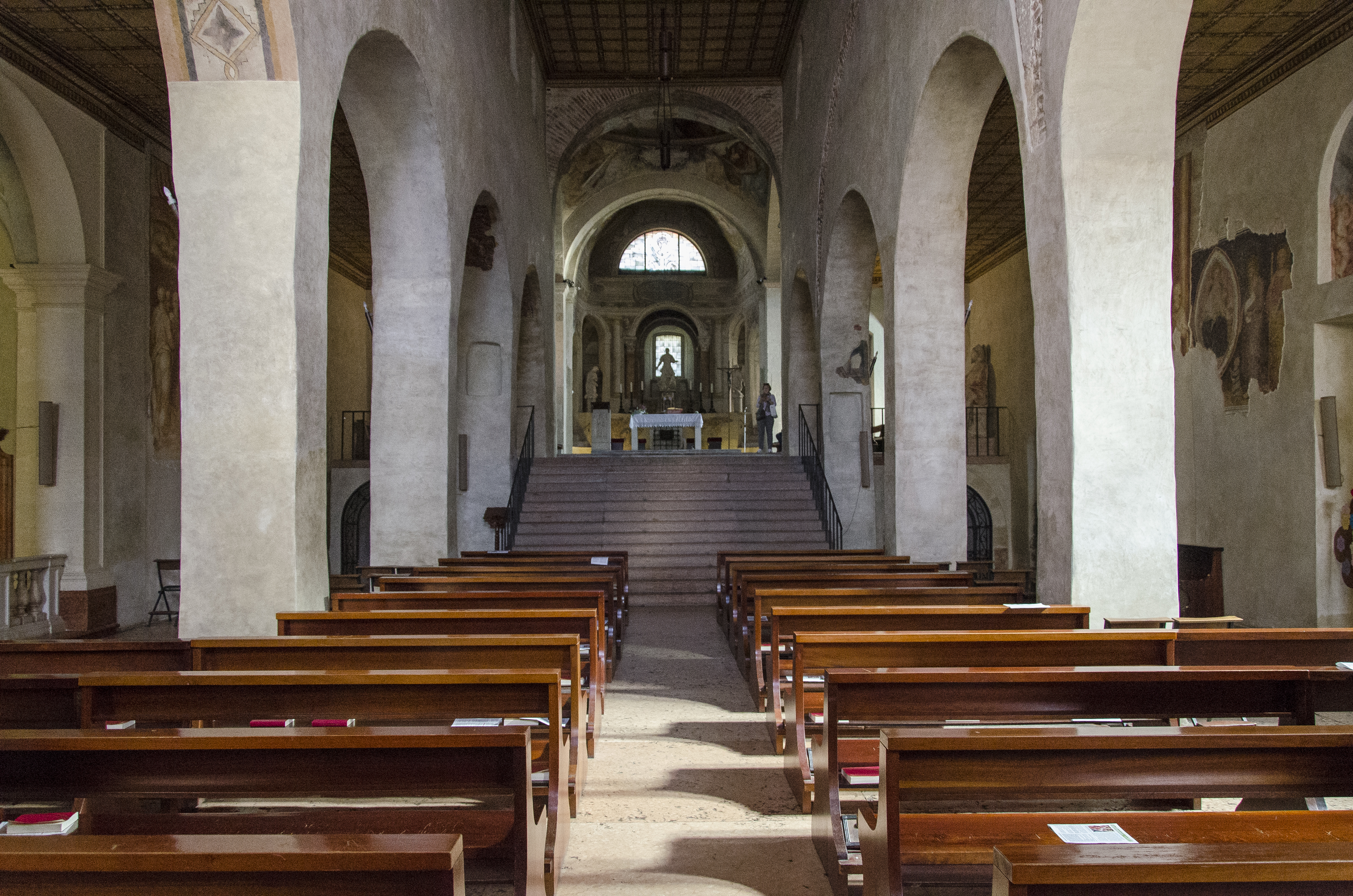 Fotografia dell'interno